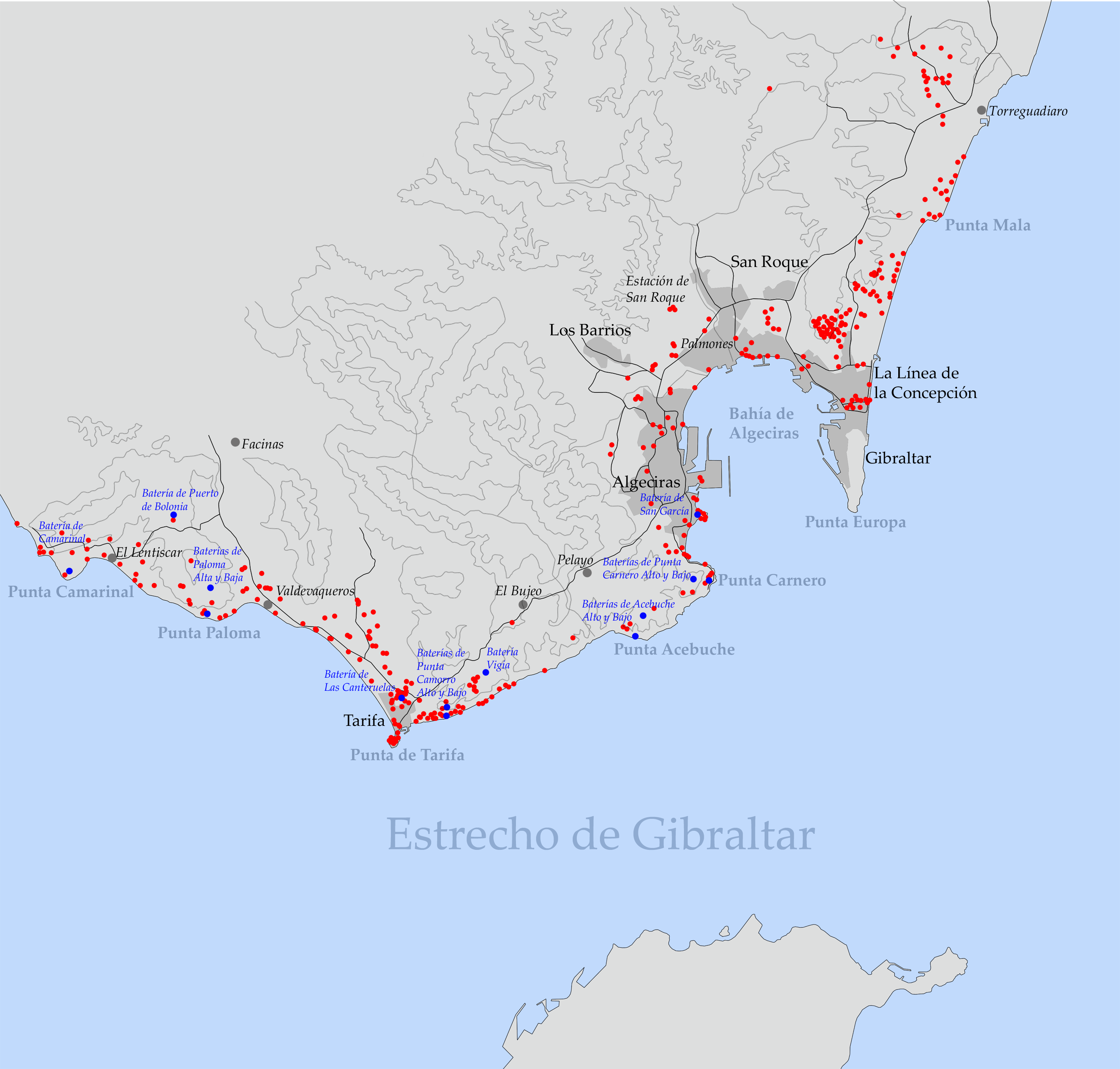 Plano de situación del sistema de búnkeres construido en el Estrecho de Gibraltar en la década de 1940.